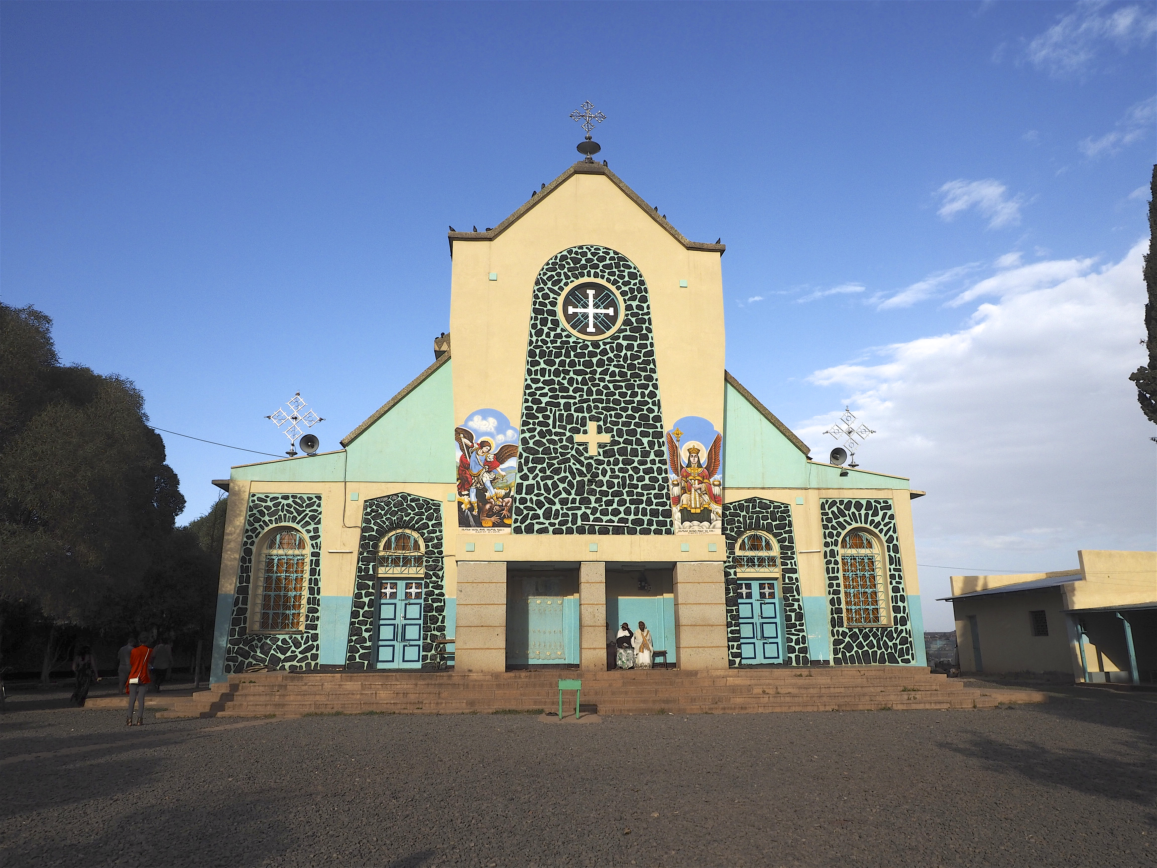 Asmara, Eritrea